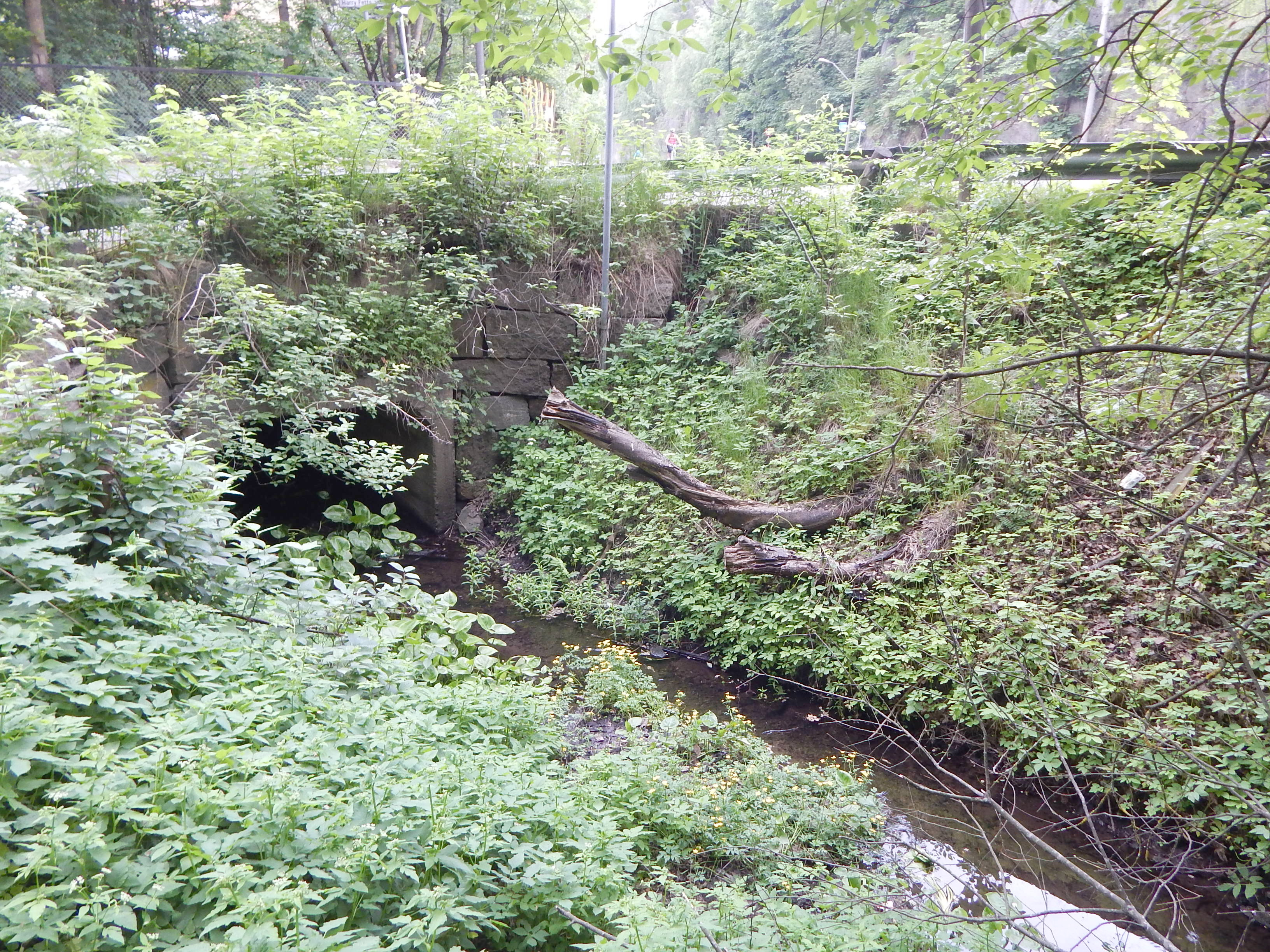 Østensjøbekken like ved Harry Fetts vei